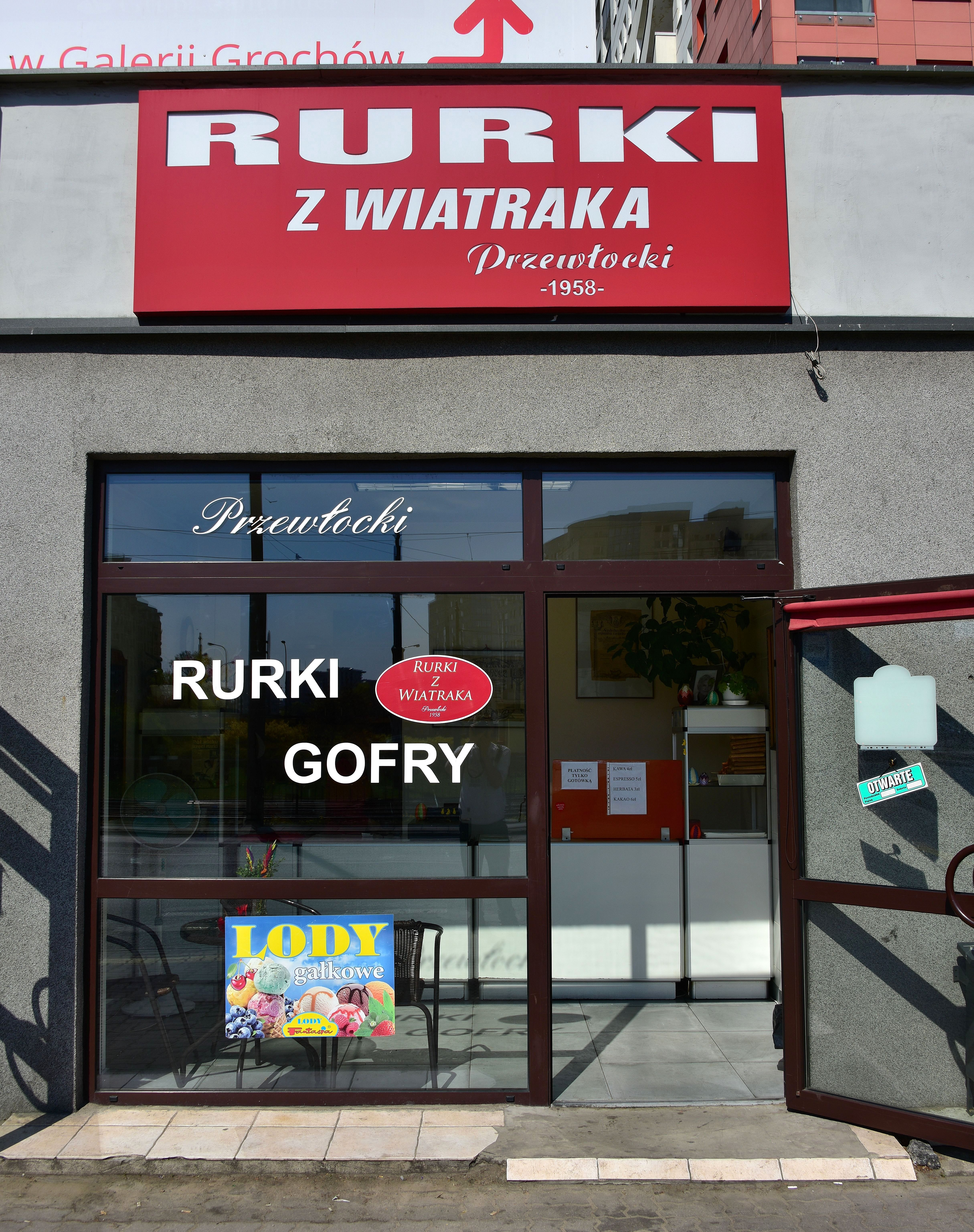 "Rurki z Wiatraka" na rondzie Wiatraczna w Warszawie